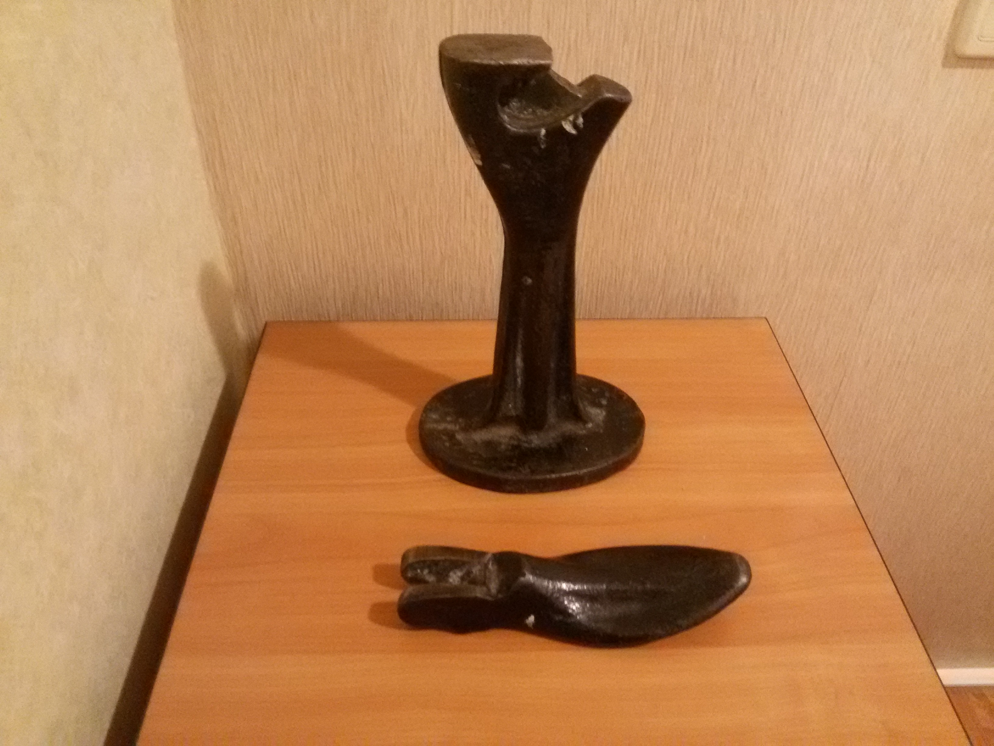 Лапа сапожная 3